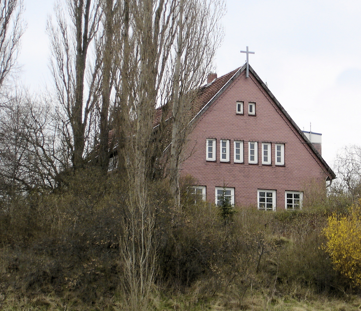 Slüterhaus Rostock Dierkow / Slüter-Church in Rostock